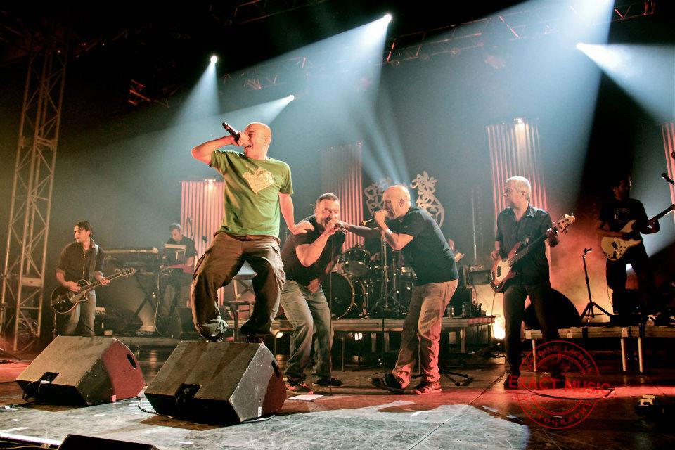 Zebda au festival de La Poule des Champs